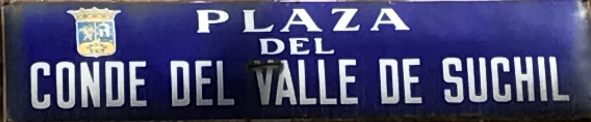 Placa de la Plaza del Conde del Valle de Suchil